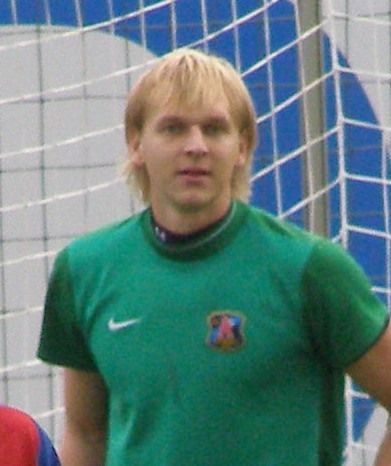 Ukrainischer Fußballspieler Serhij Pohorilyj während dem Spiel zwischen Arsenal Kyjiw und Metalist Charkiw